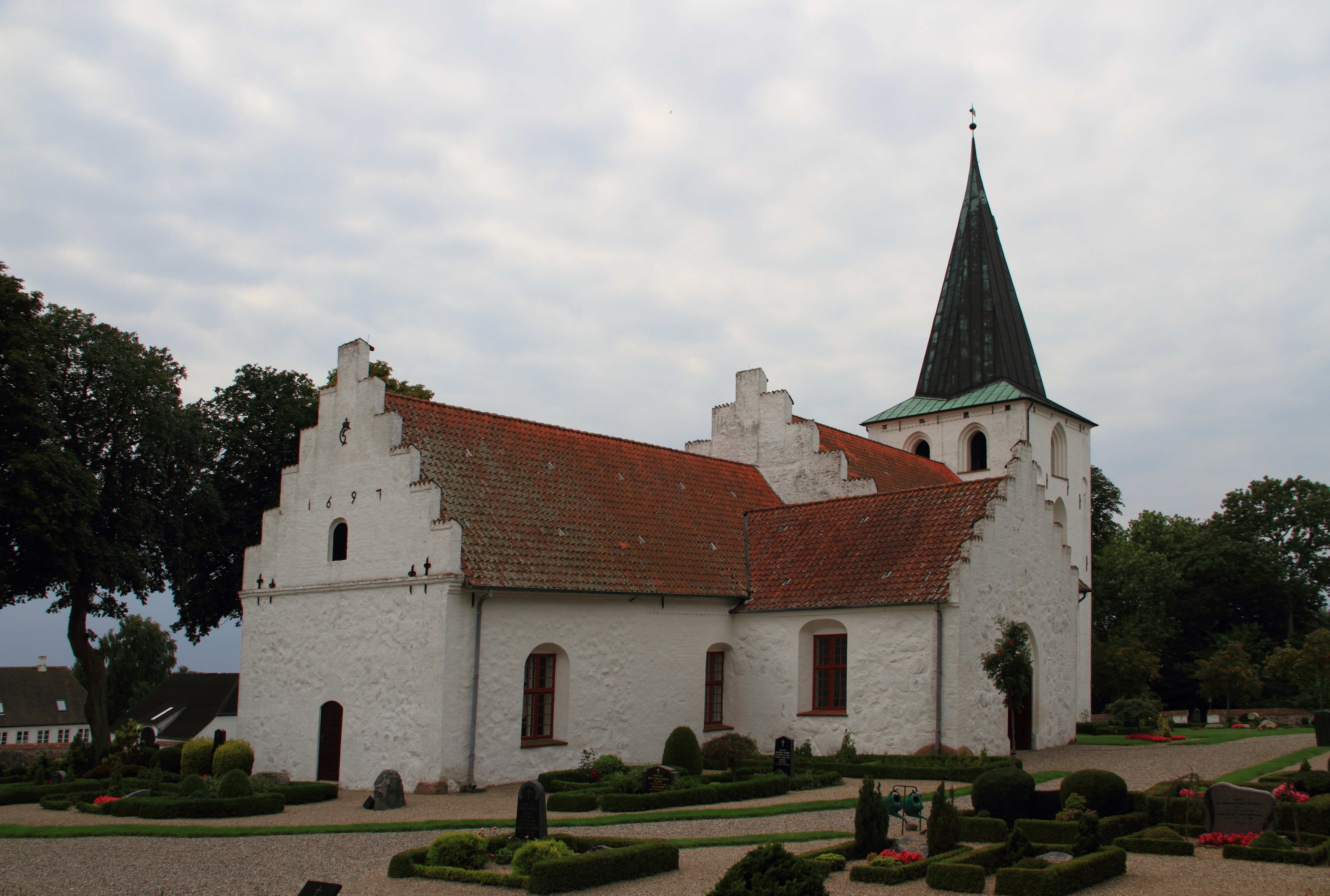 Die Rise Kirke auf der dänischen Insel Ærø.